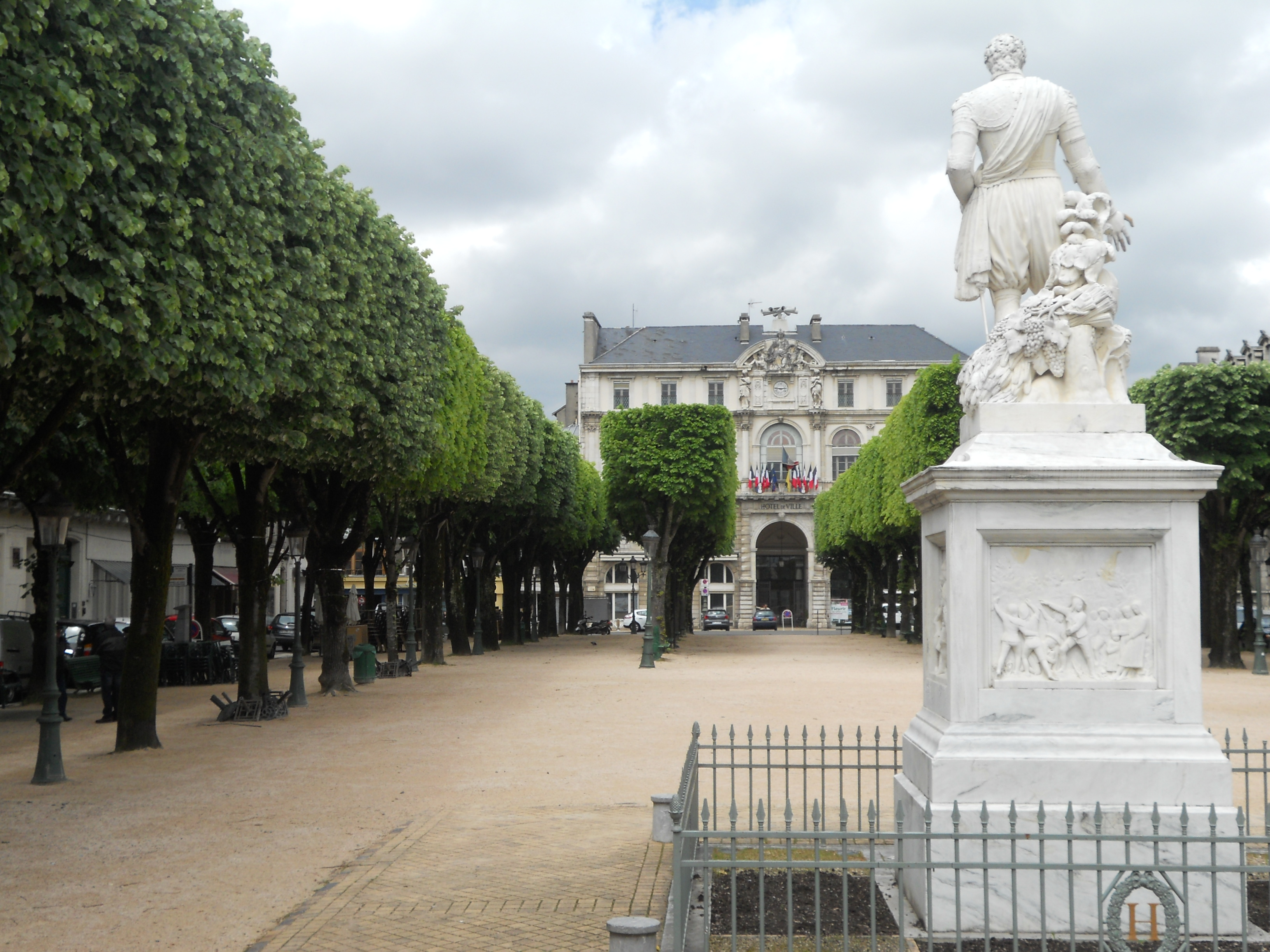 Place Royale de Pau derrière la statut d'Henri IV avec la Mairie de Pau en fond